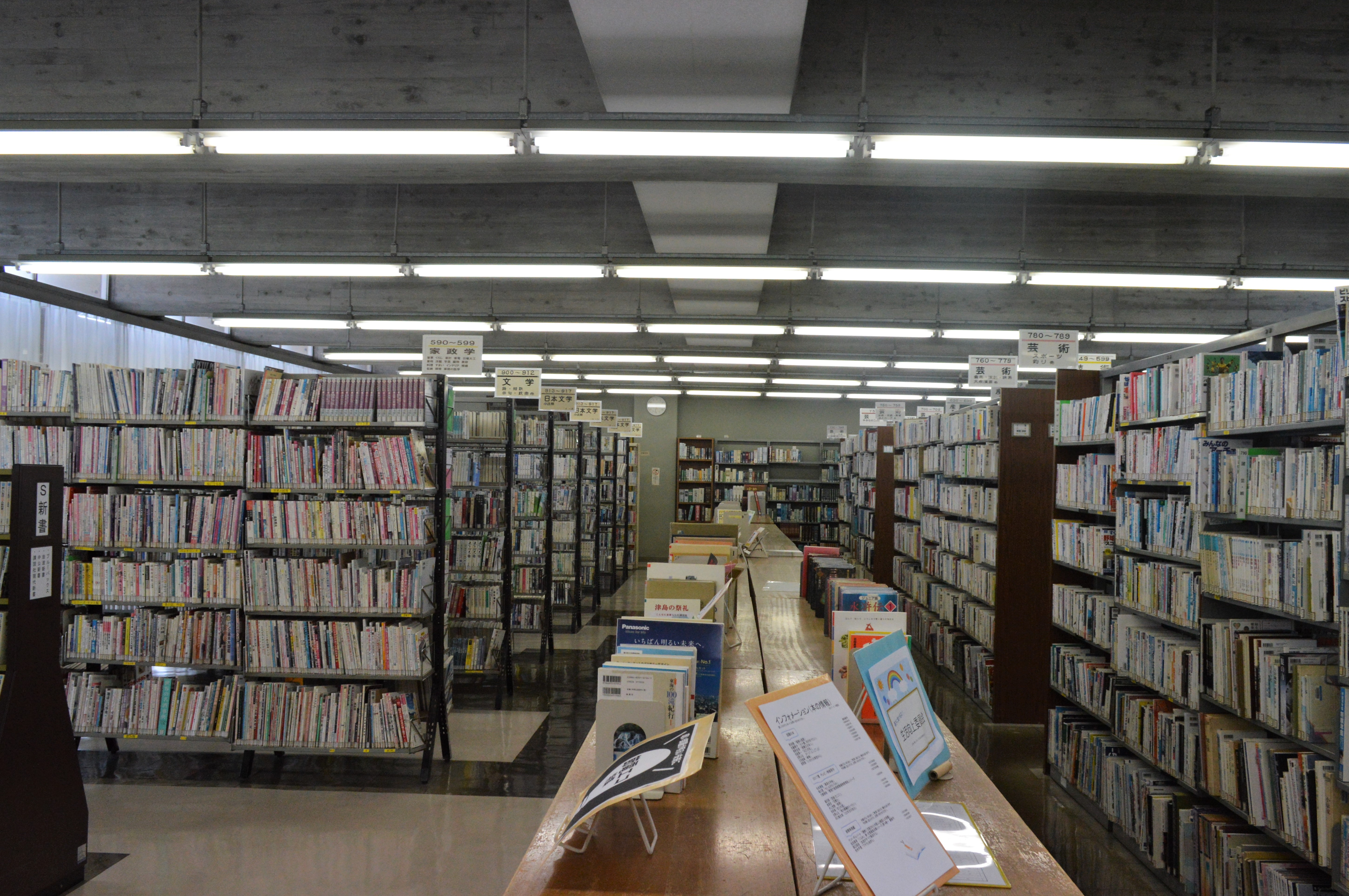 常滑市立図書館。2階の一般書。